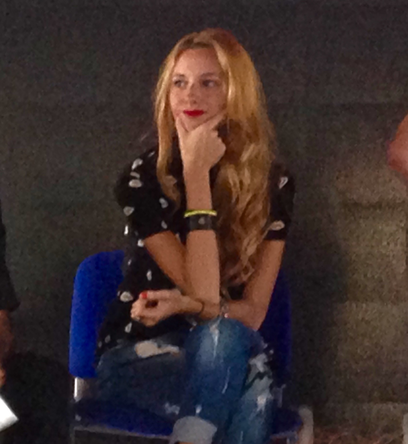 Claudia Alfonso a Rimini per la festa della rete nel 2015